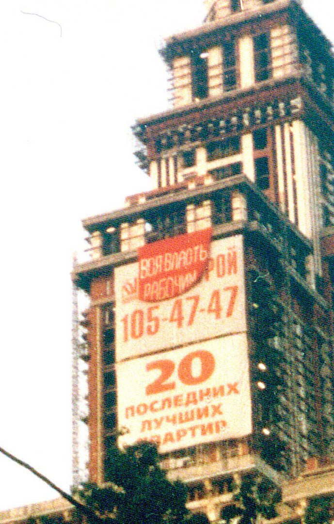 7 мая 2004г. Москва. Баннер РРП на Триумф Паласе.